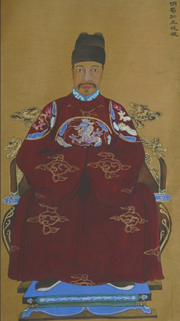 蜀和王朱悅𤉎（1395年－1461年），明朝第四代蜀王，獻王朱椿庶第五子。他在永樂二年（1404年）受封保寧王，宣德十年（1435年）晉封蜀王。